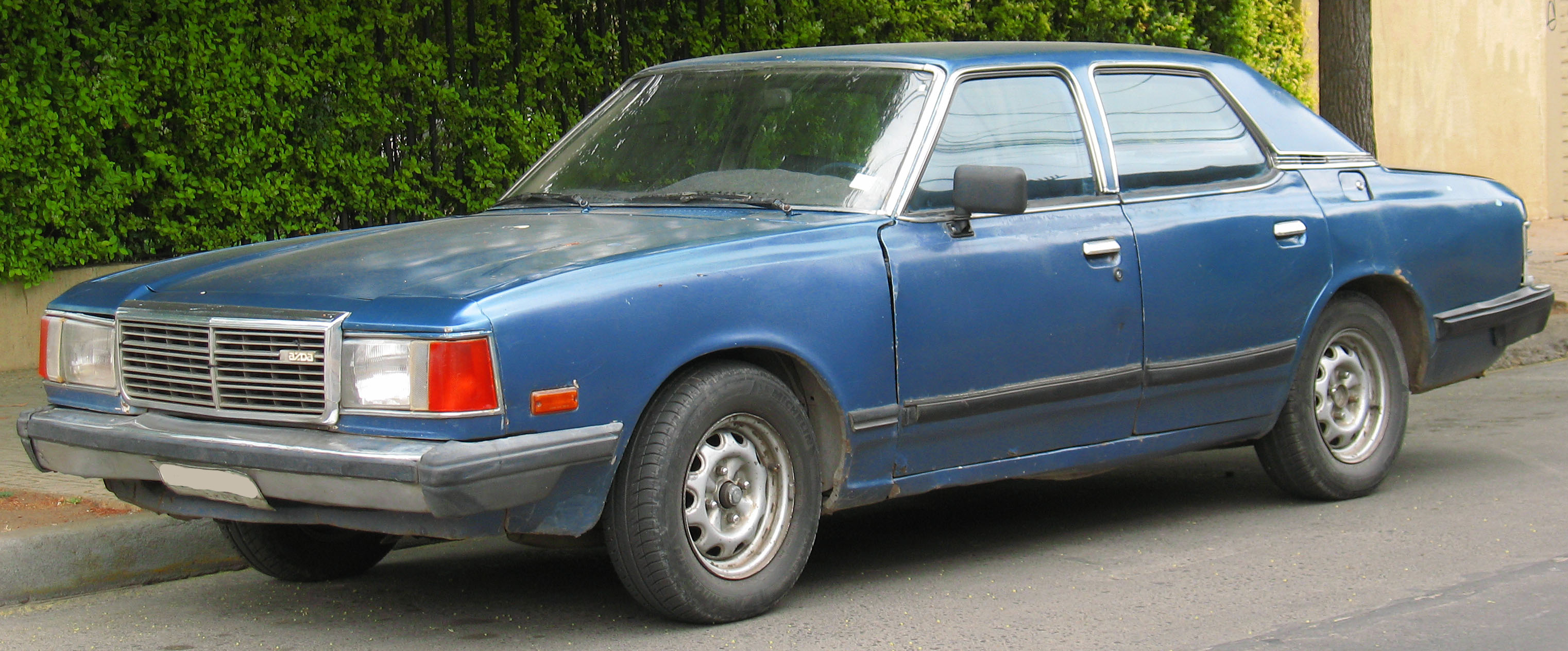 Mazda 929 2.0 Hardtop 1981